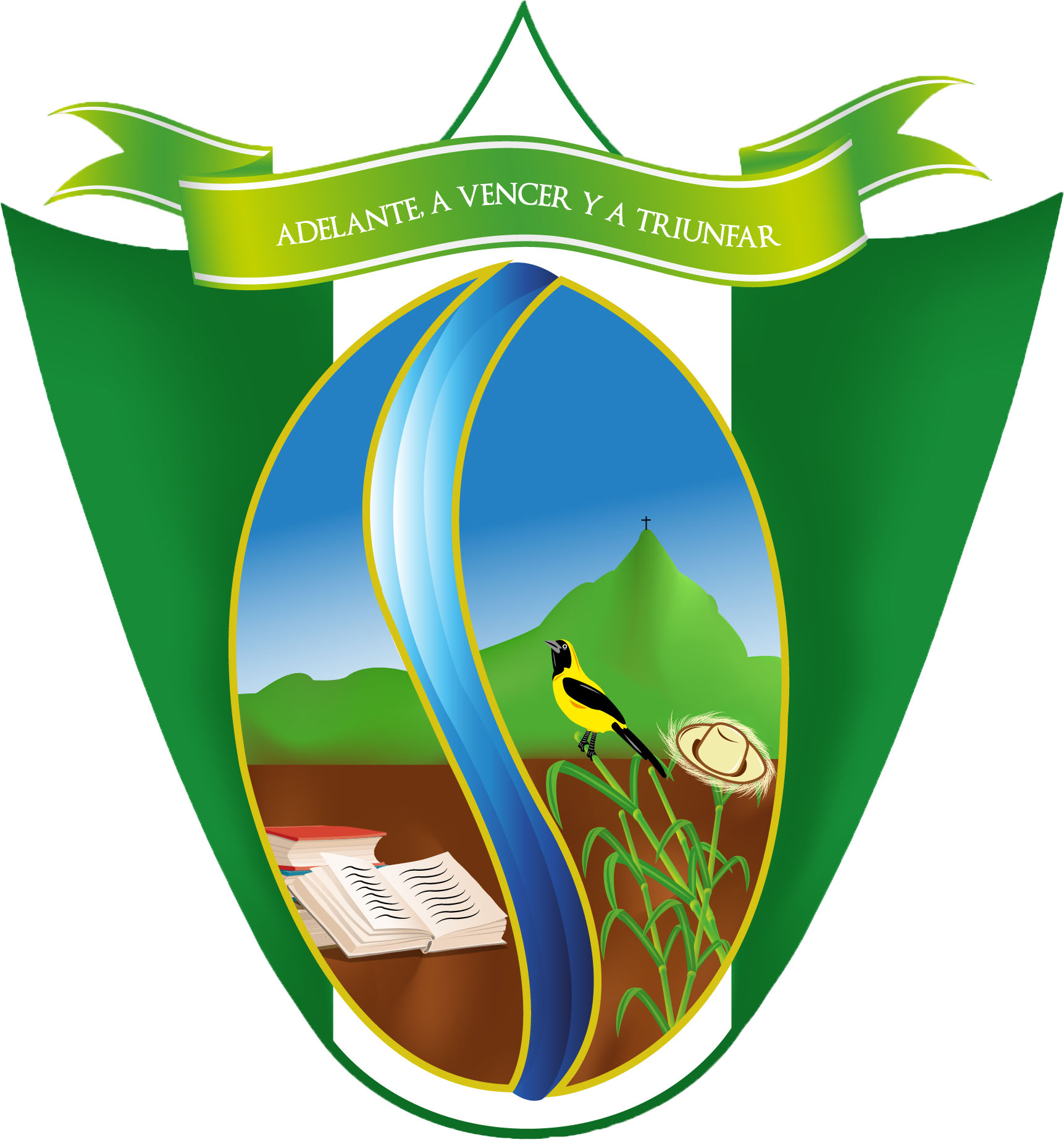 Escudo municipal de Colon Genova.